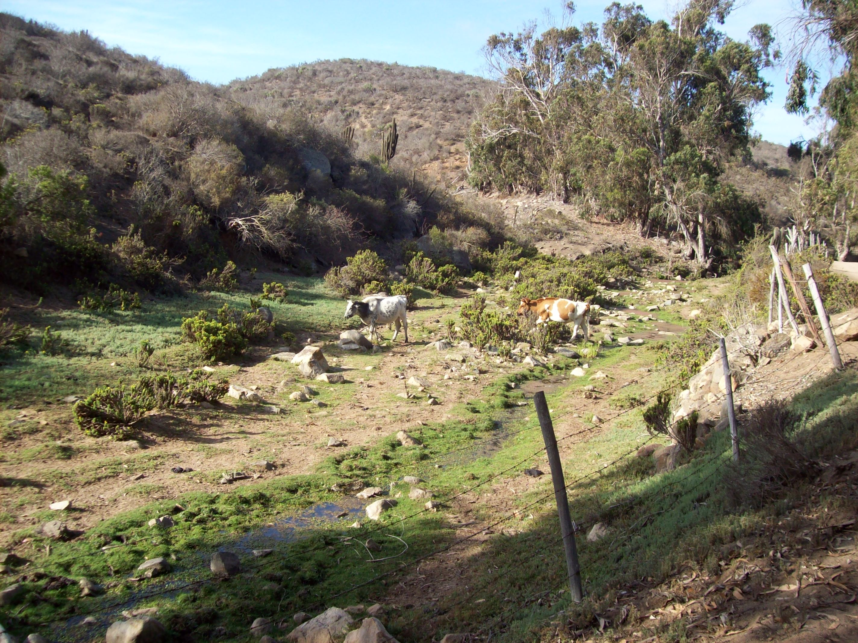 paisaje de la comuna en años lluviosos